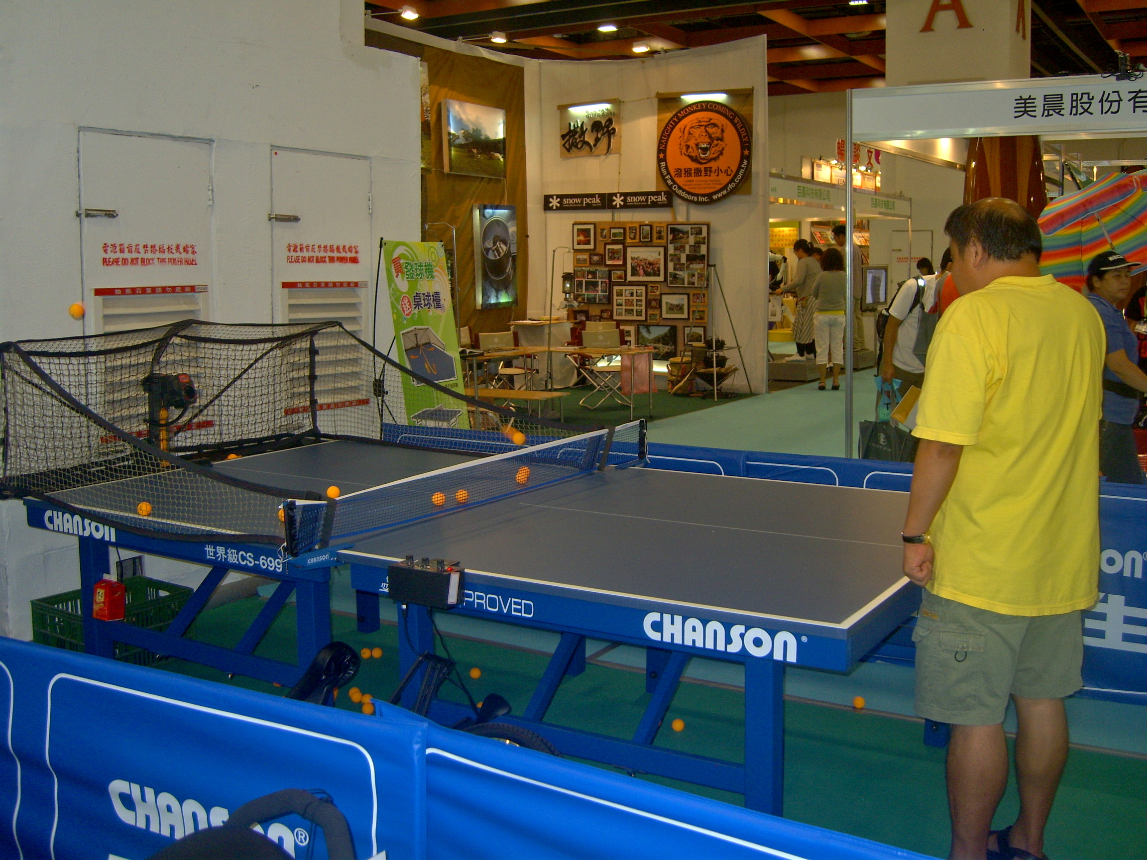 2008 Leisure Taiwan: Chanson CS-5003 Table Tennis Machine.